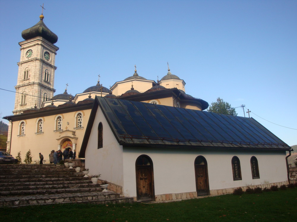 Стара_и_нова_црква_у_Чајничу.